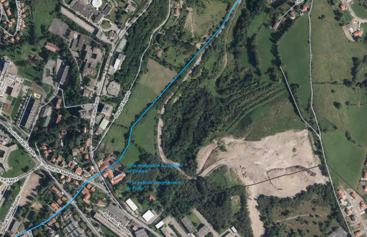 Géolocalisation de l'ancienne voie des pèlerins du Puy, quartier de la Palle-Terrenoire, Saint-Etienne, Loire, France.